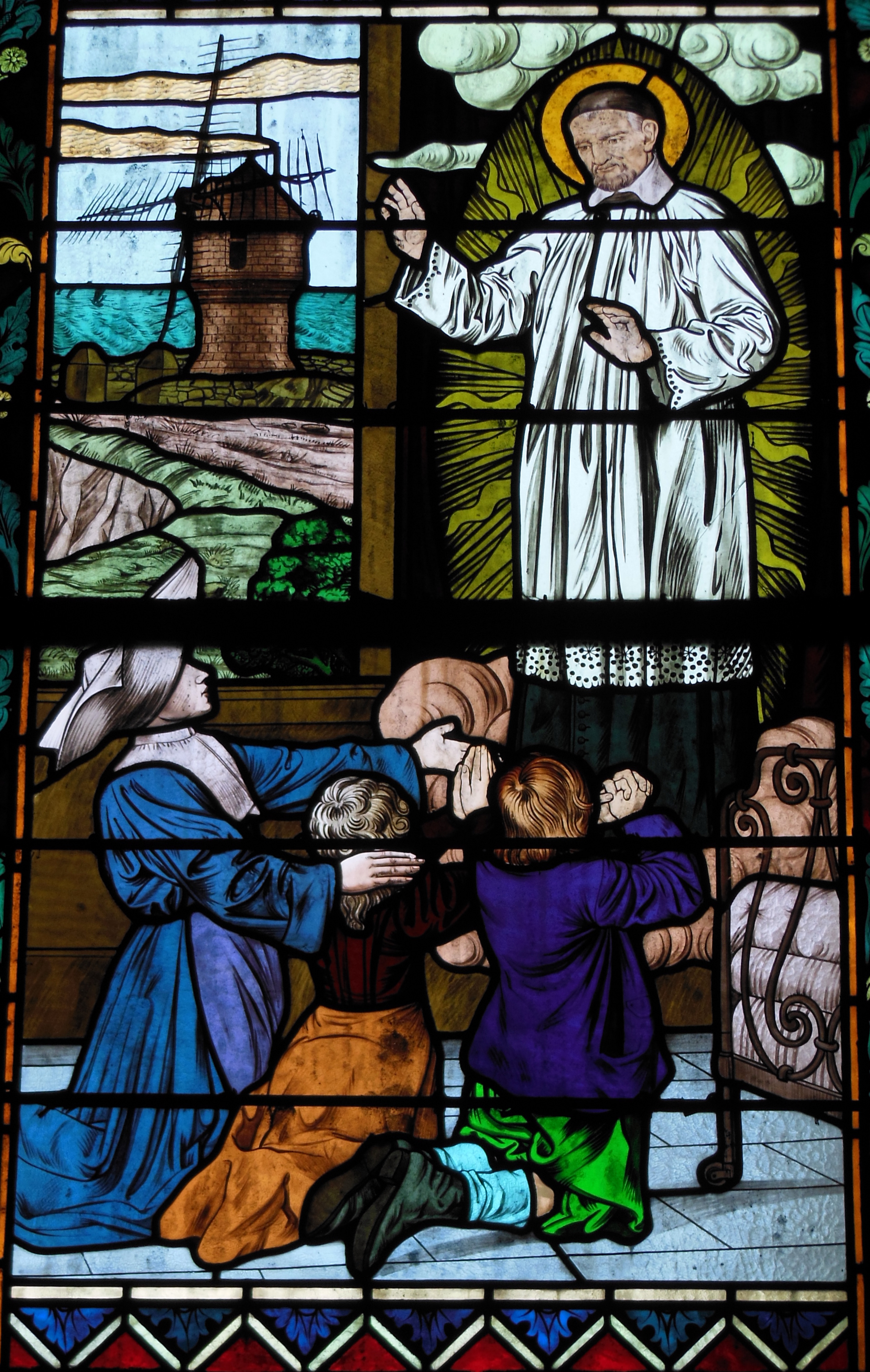 Chapelle de Pen Bron, vitrail représentant St Vincent de Paul avec la légende "Comment Saint Vincent de Paul initia les filles de la charité à leur mission hospitalière". Le moulin de Crémeur (dit Moulin du diable) de Guérande est également représenté.